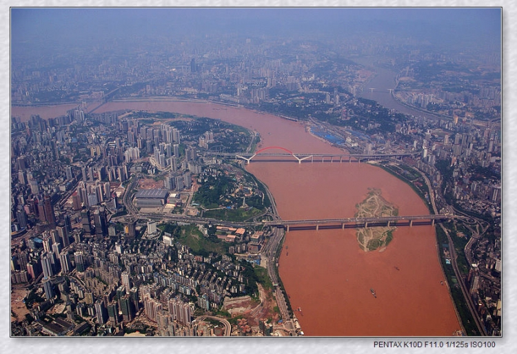 飞机上俯瞰南岸